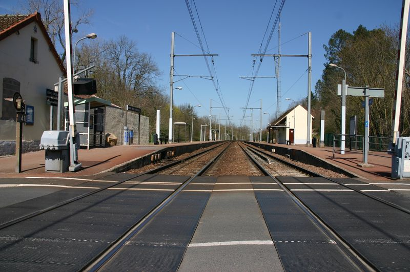 Gare de Buno-Gironville. A gauche : la voie vers Maisse/Paris. A droite: la voie vers Boigneville/Malesherbes.